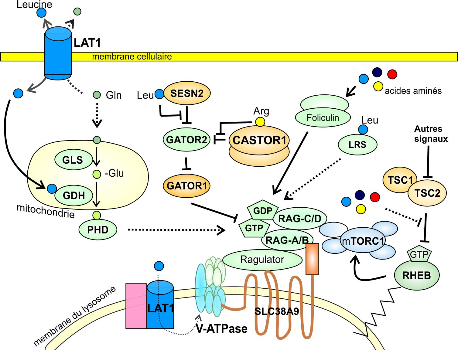 Figure inspirée de Yann Cormerais, Acides aminés et cancer, thèse Un. Nice Sophia Antipolis (2017) La régulation de mTORC1 par les acides aminés se fait principalement au niveau du ratio GDP/GTP des RAG. Les inhibiteurs de l'activité mTORC1 sont en jaune ocre, les activateurs en vert.